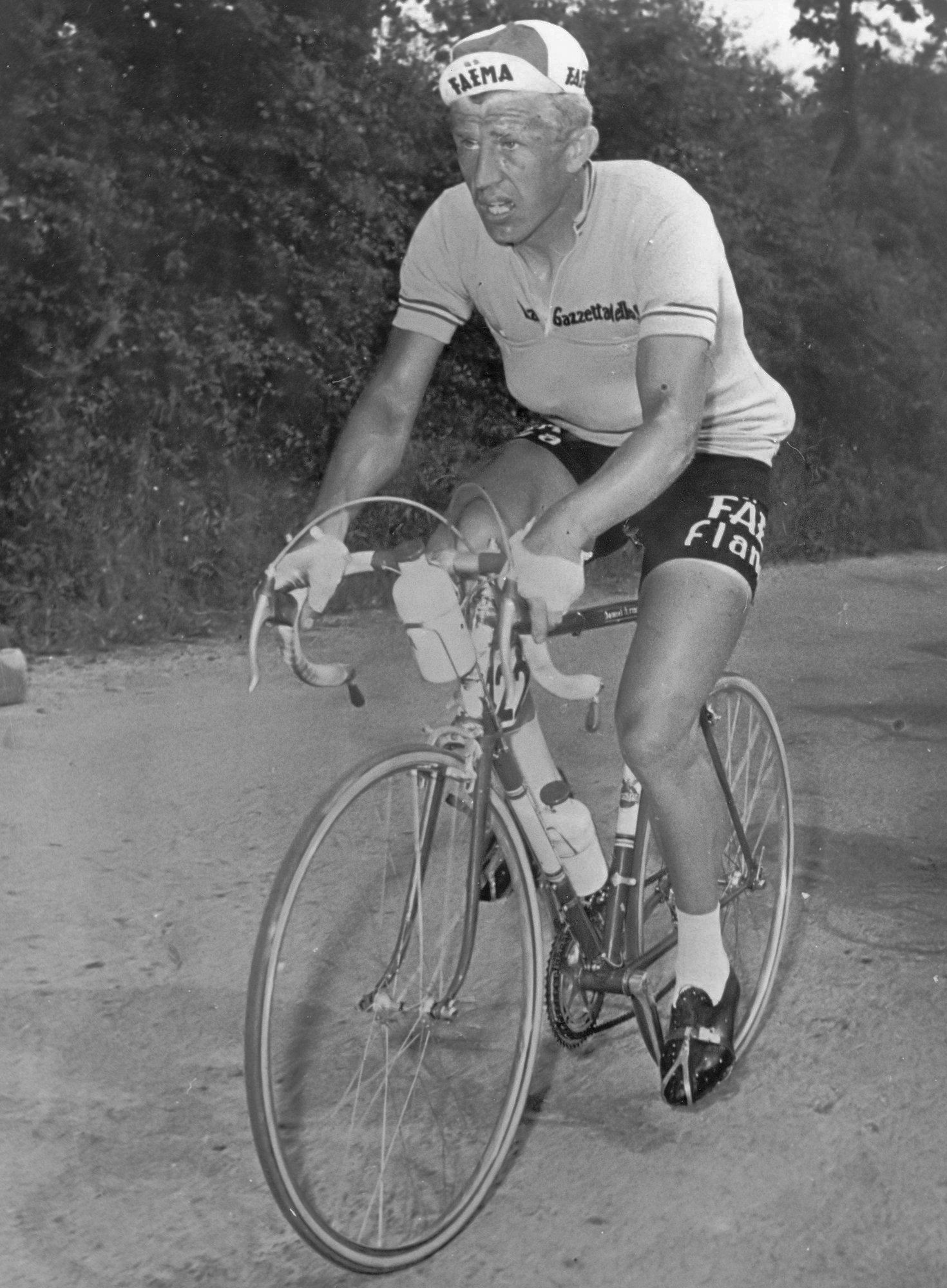 Armand Desmet (Waregem, 23 januari 1931) is een voormalig Vlaams wielrenner.